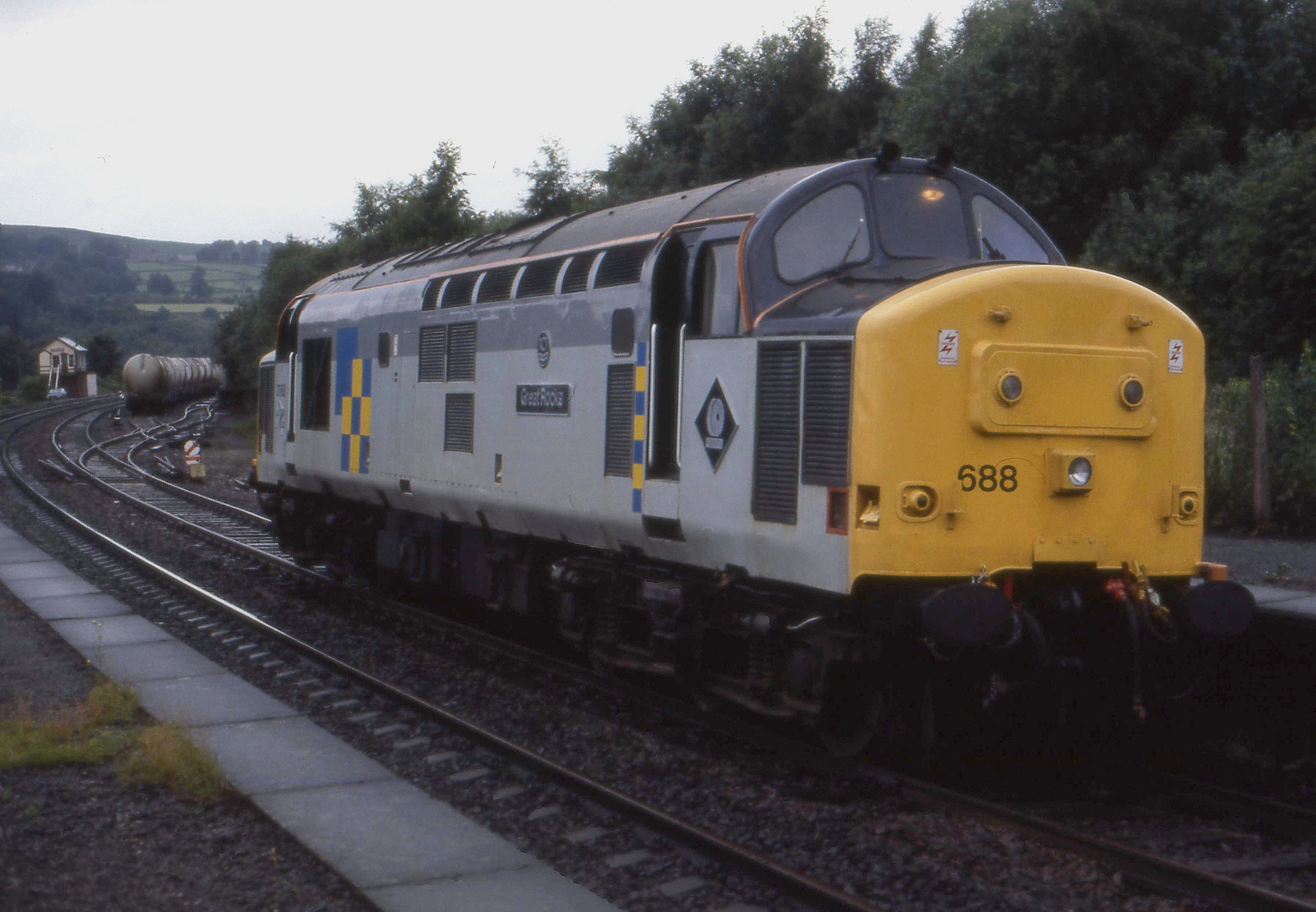 37688 Grindleford Station